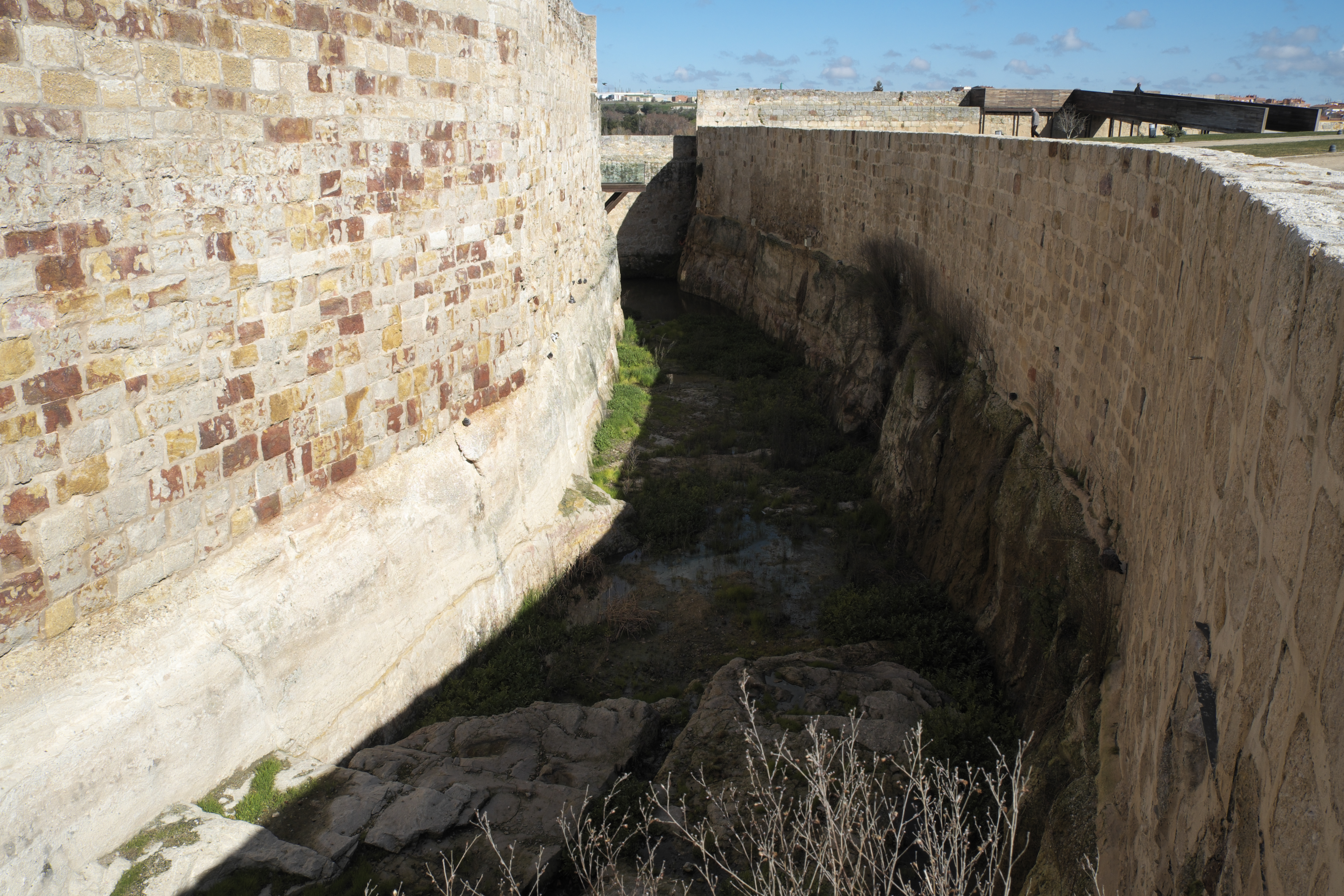 Burg von Zamora (Kastilien-León/Spanien), Wassergraben